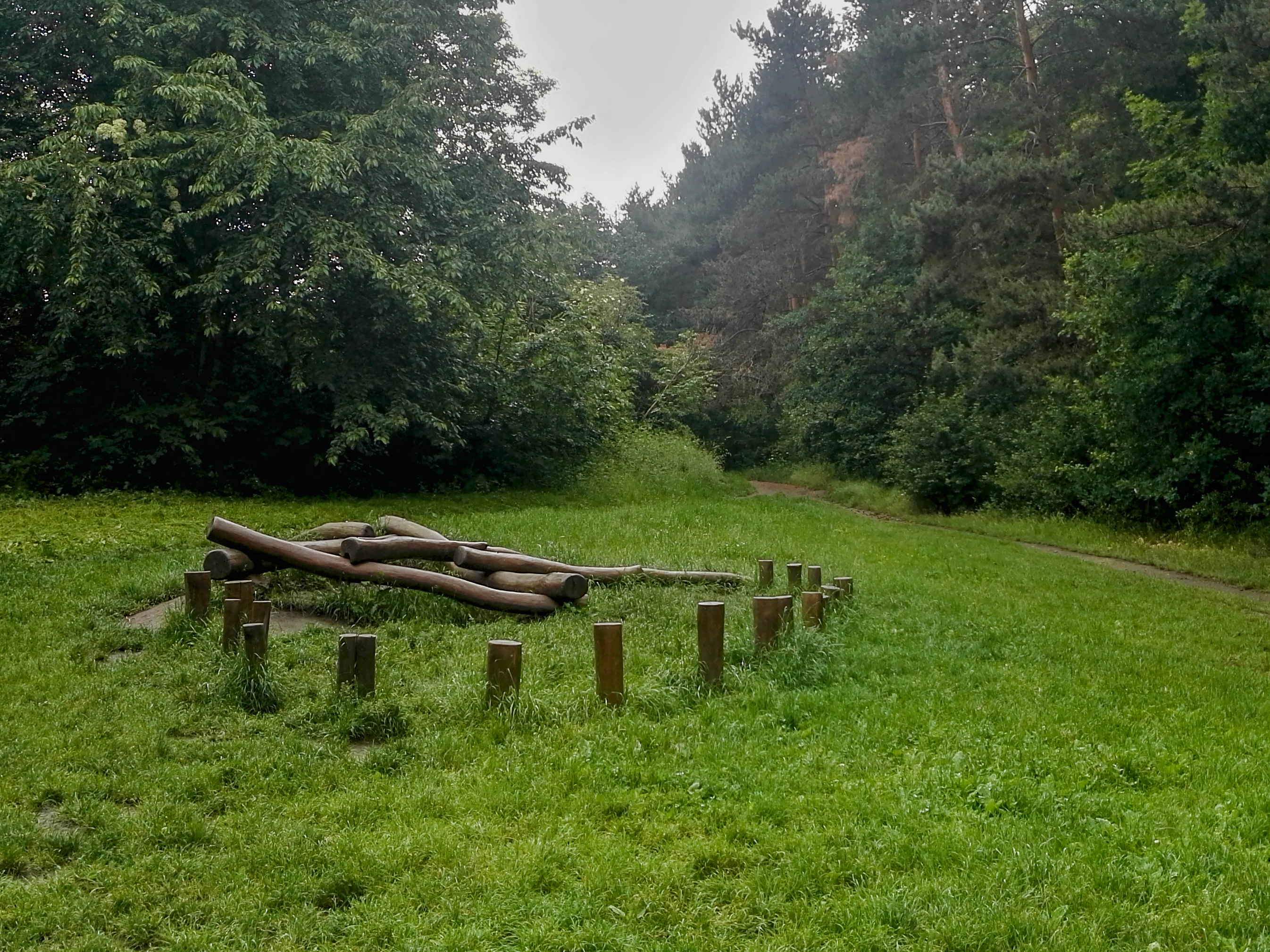 Malešický les, herní prvek u piknikového místa